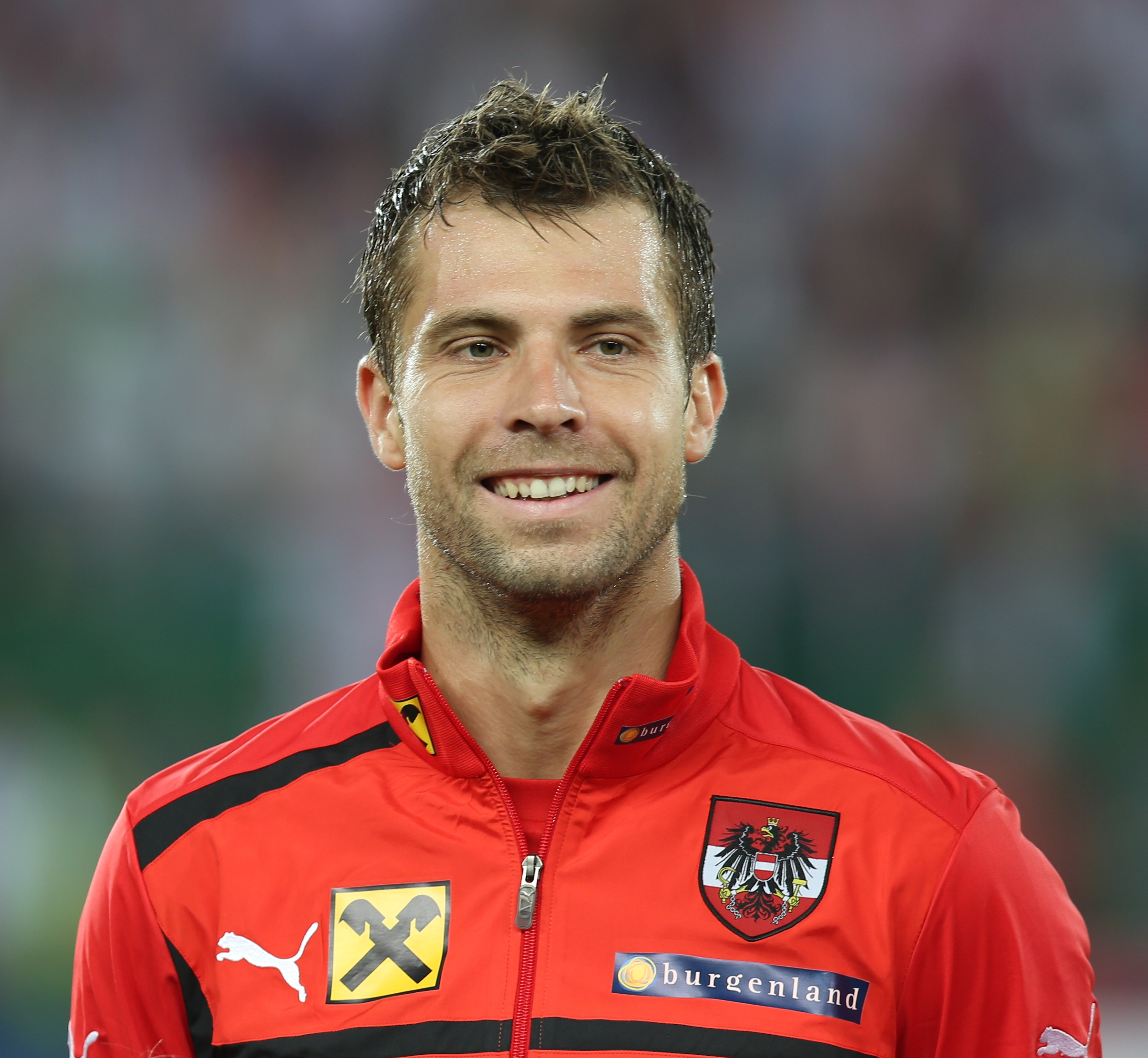 Fußball-Weltmeisterschaft 2014/Qualifikation (UEFA), Gruppe C, 11. September 2012, Österreich gegen Deutschland im Wiener Ernst-Happel-Stadion. The making of this work was supported by Wikimedia Austria. For other files made with the support of Wikimedia Austria, please see the category Supported by Wikimedia Österreich.